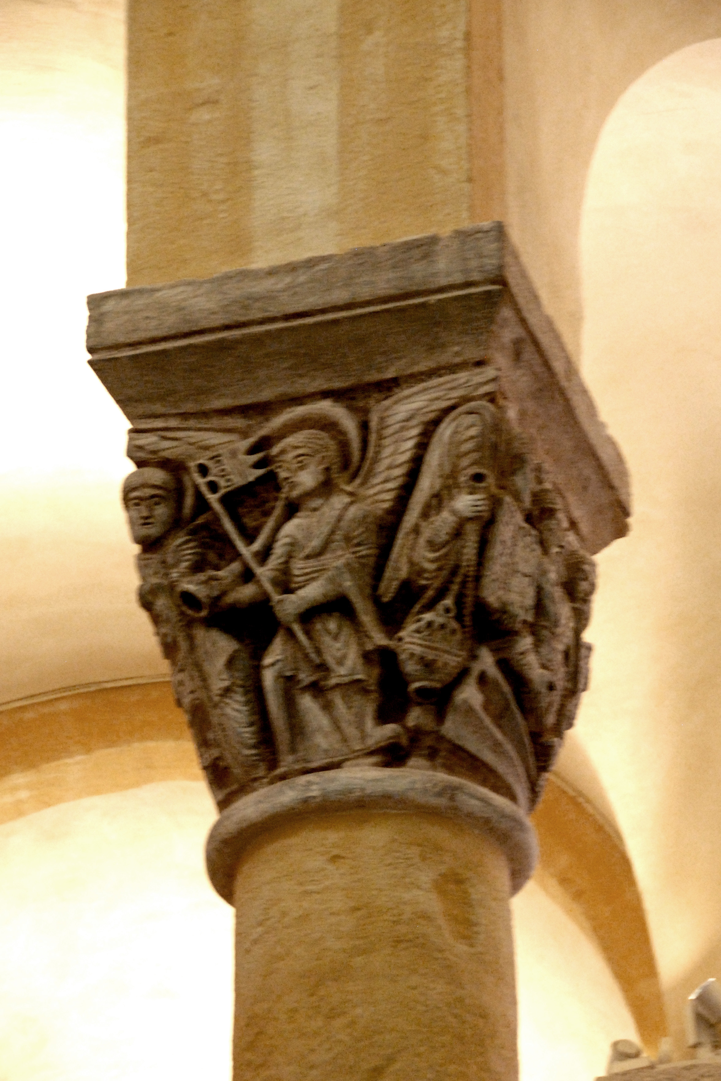 Notre-Dame du Port, Chorkapitell D, Seite 15